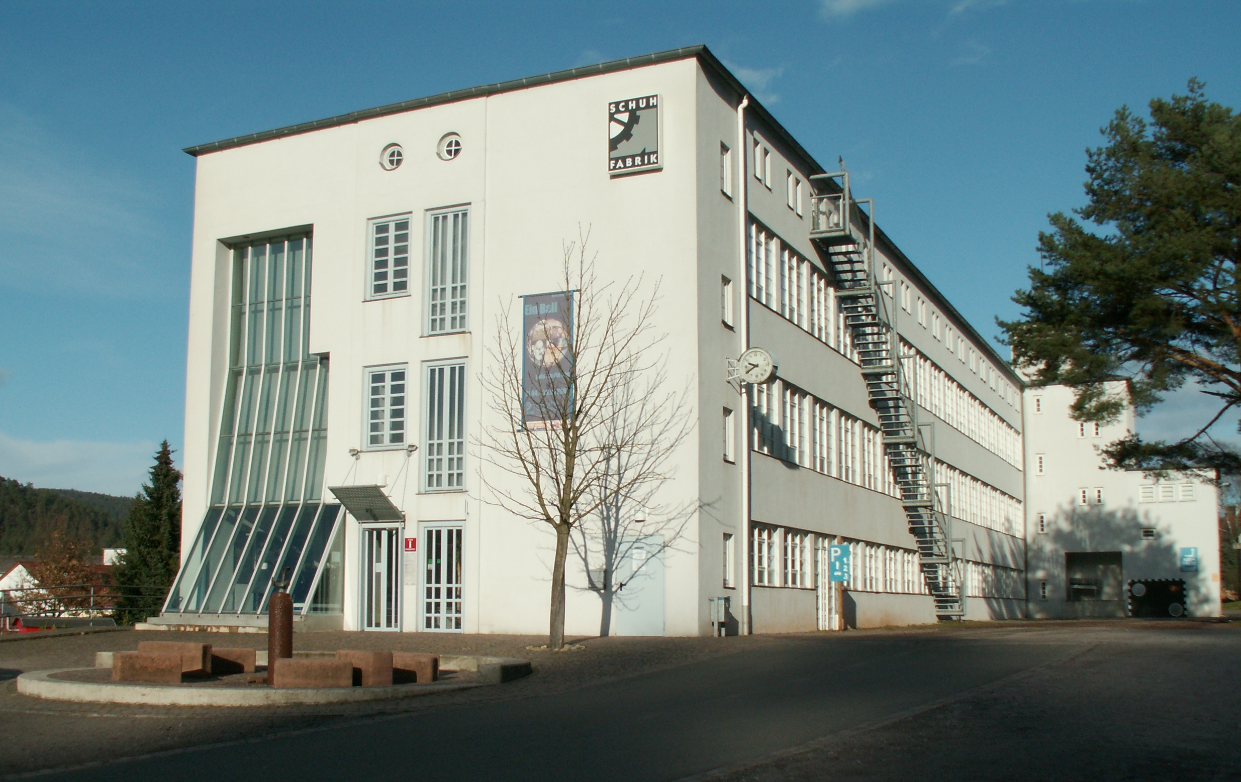 Außenansicht des Deutschen Schuhmuseums Hauenstein